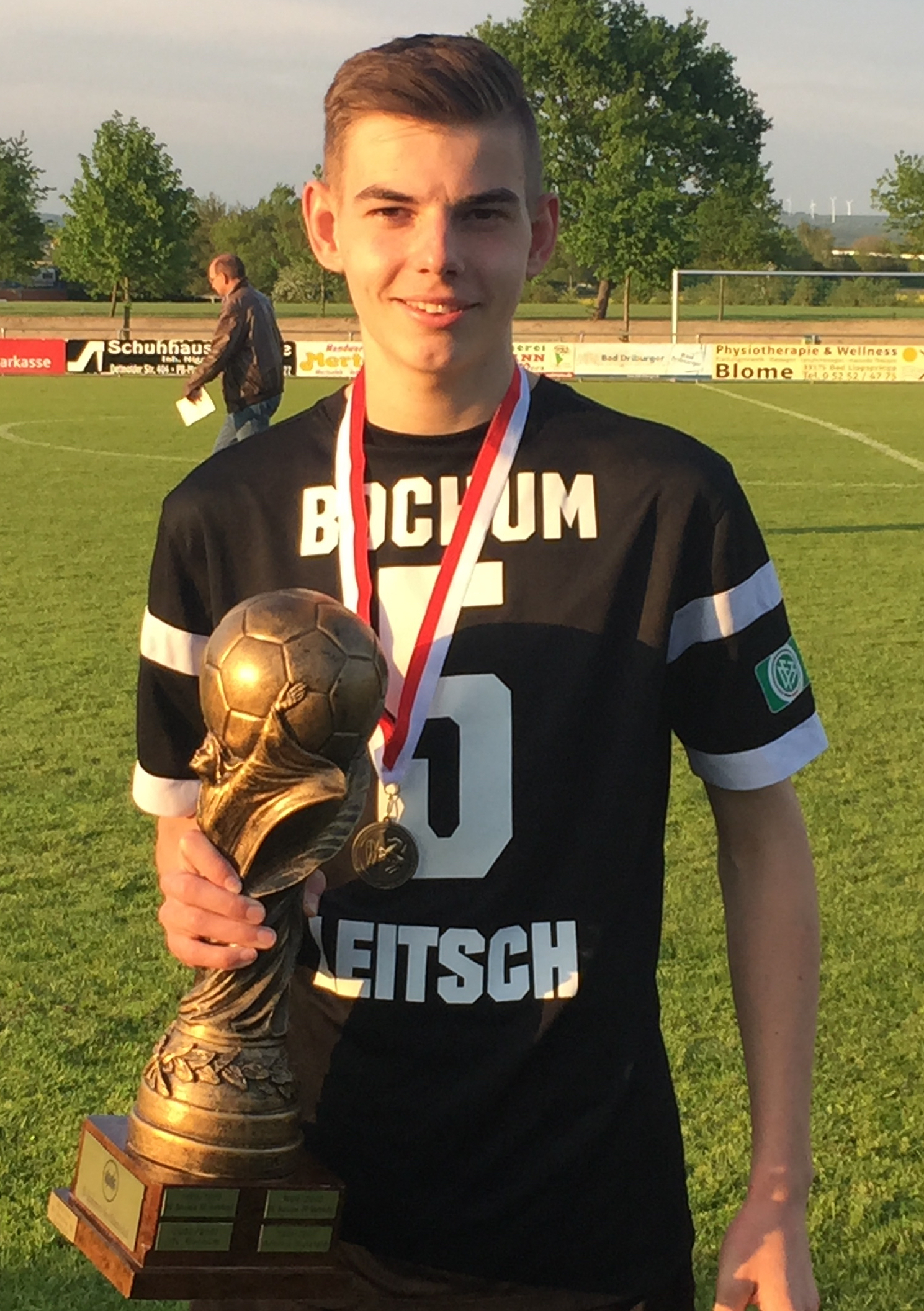 Maxim Leitsch Fußballer VFL Bochum